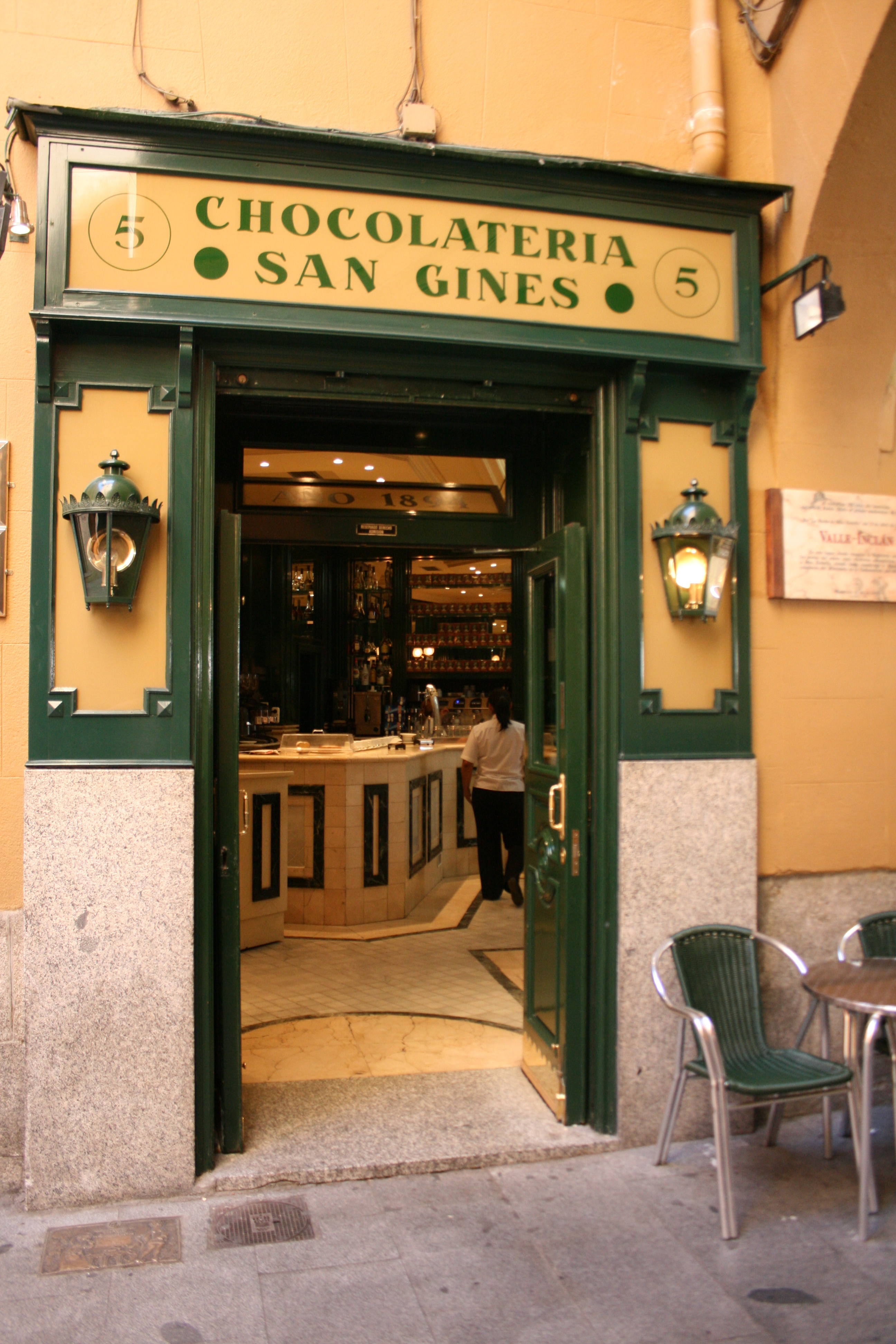 Chocolatería "San Gines" - Madrid